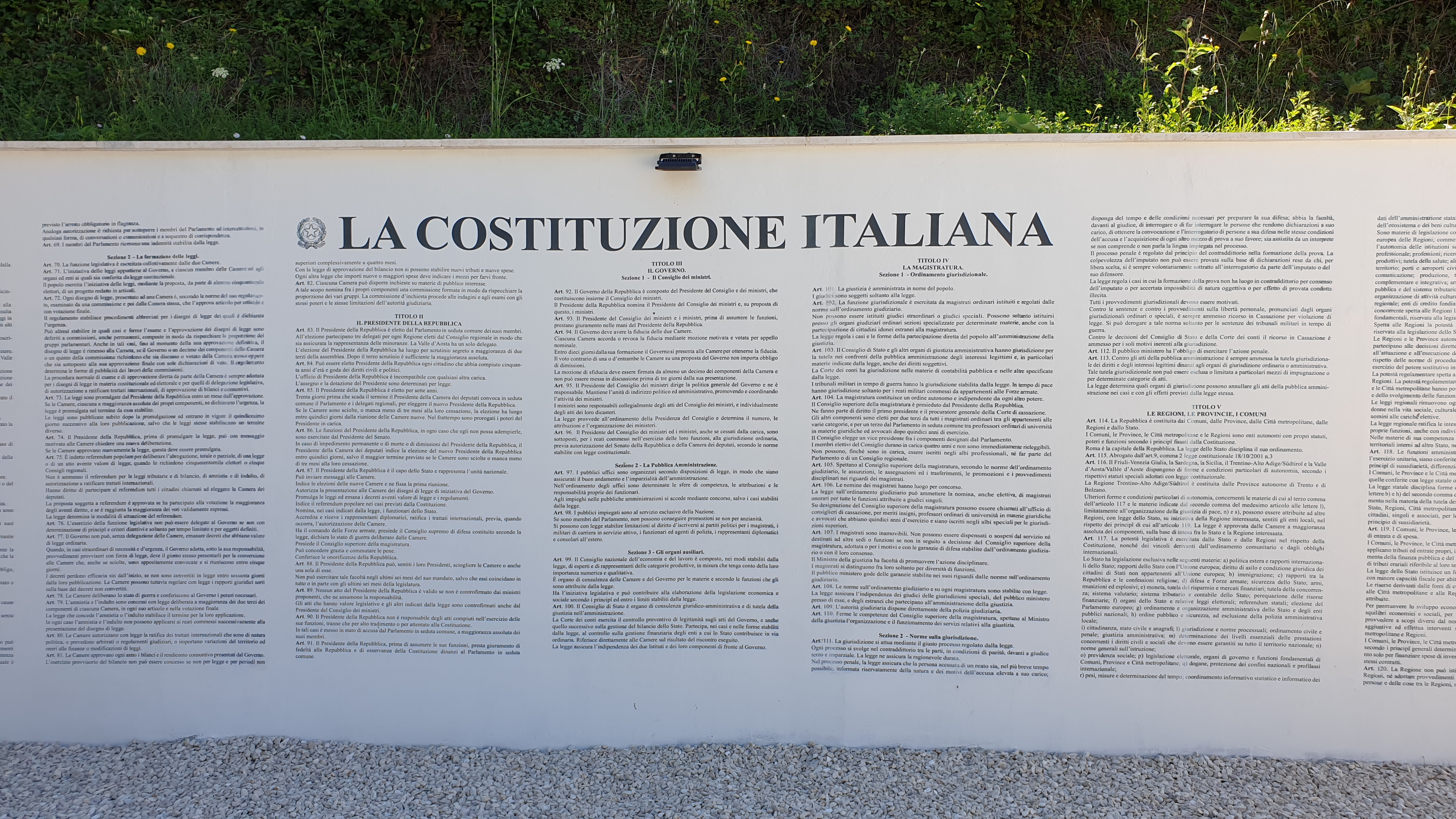 Aielli - Borgo universo